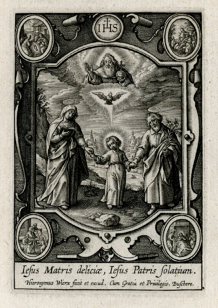 Hieronymus Wierix, Aardse en hemelse Drieëenheid, British Museum London